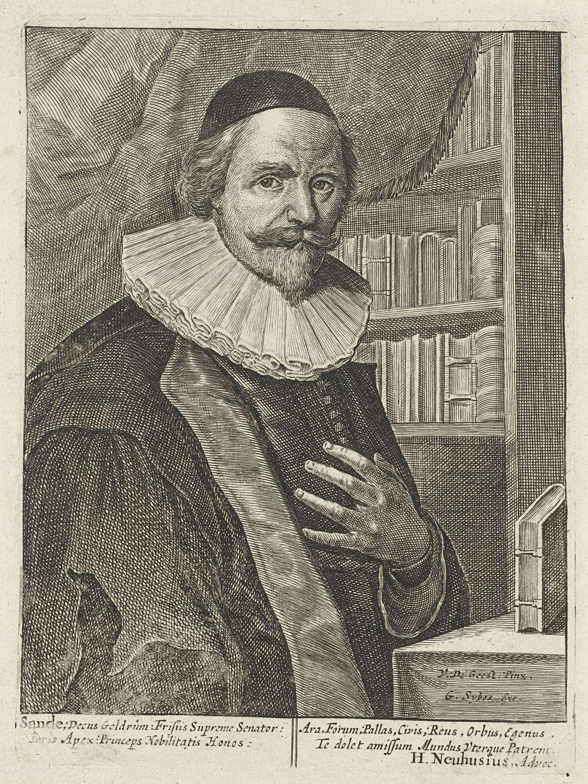 Portret van Johan van den Sande voor een boekenkast. Zijn linkerhand houdt hij voor zijn borst. Onder in de marge een vierregelig onderschrift in het Latijn. Objectnummer: Collectie Rijksmuseum Amsterdam, RP-P-OB-68.019 Prentmaker: anoniem, naar schilderij van: Wybrand de Geest (I) (vermeld op object) schrijver: Henricus Neuhusius (vermeld op object) uitgever: Gysbert Sybes (vermeld op object) Plaats vervaardigingprentmaker: Nederlanden naar schilderij van: Leeuwarden schrijver: Leeuwarden uitgever: Leeuwarden Datering1638 - 1660